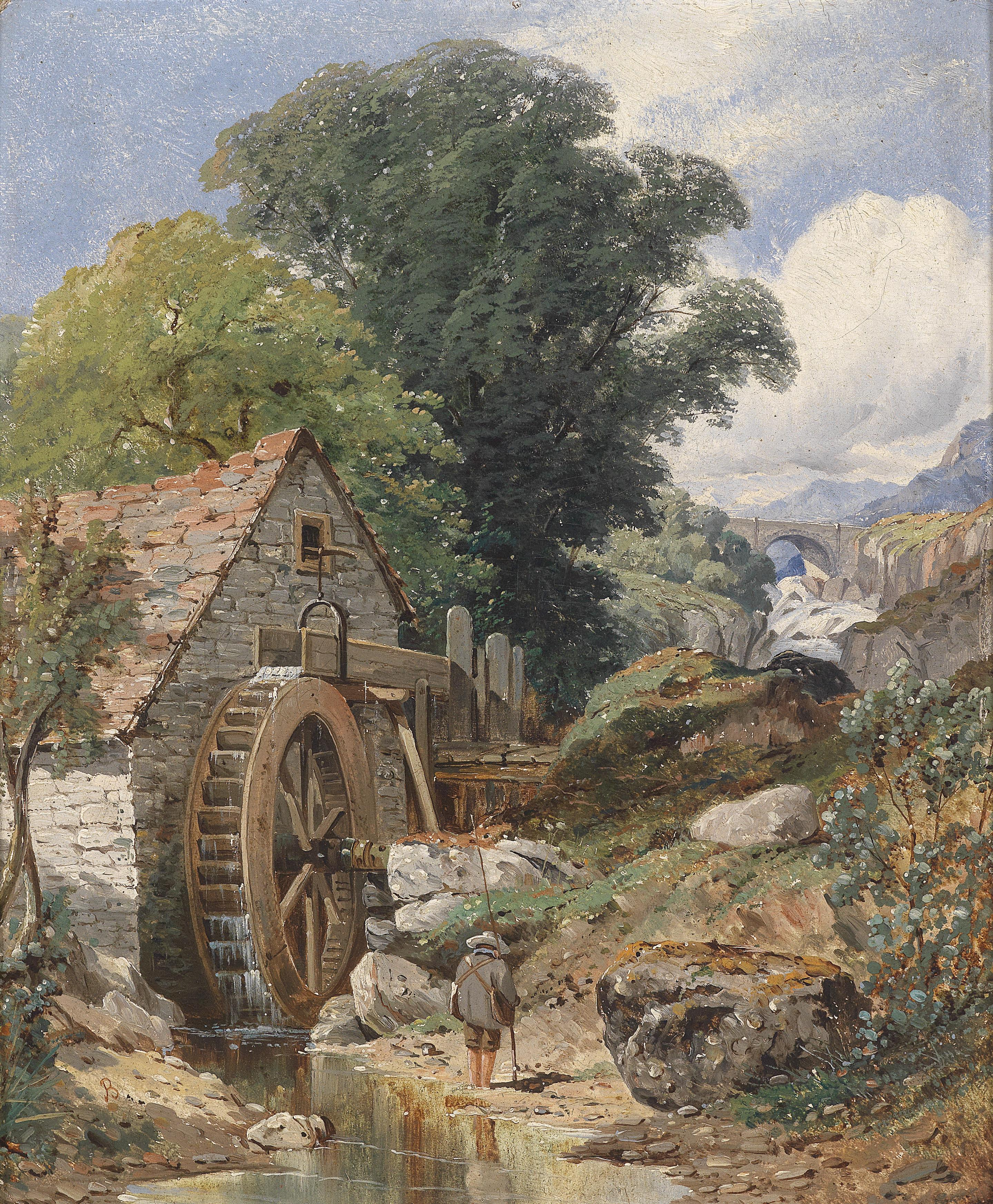 Eine Mühle in der Nähe von Rhydlanfair / Wales, monogrammiert B., Rückseite bezeichnet, Öl auf Karton, 30 x 25,5 cm